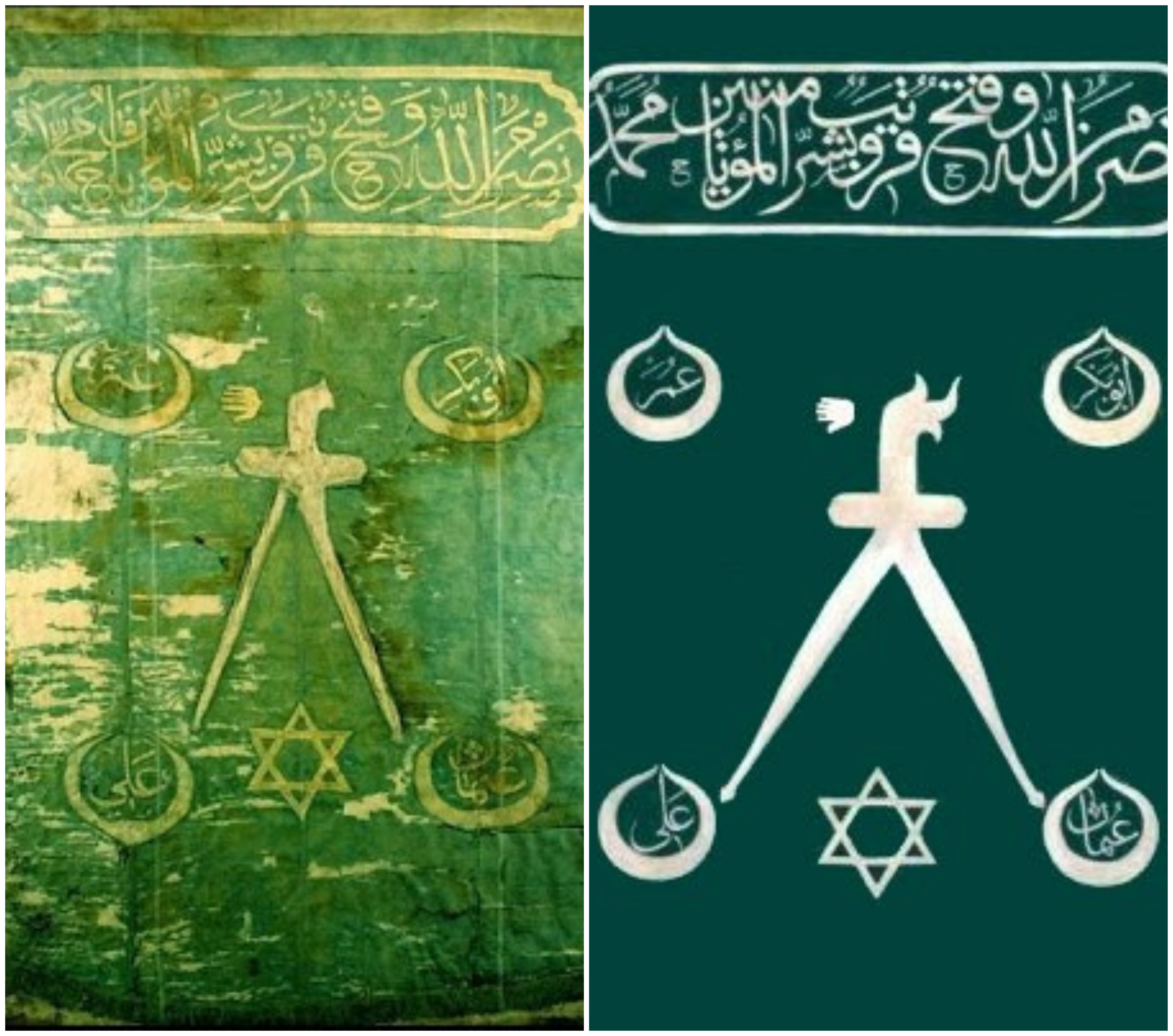 Barbaros Hayrettin Paşa'nın sancak nişanı